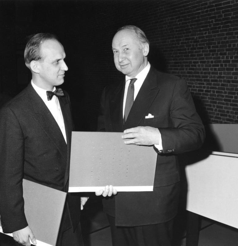 Berlin/West In einer Feierstunde, am Sonntag,den 21.4.1963, in der Akademie der Künste, verleiht der Senator für Wissenschaft und Kunst, Dr. Adolf Arndt, den diesjährigen Berliner Kunstpreis. "Jubiläumsstiftung 1848/1948 und den Preis "Junge Generation" für 1963.